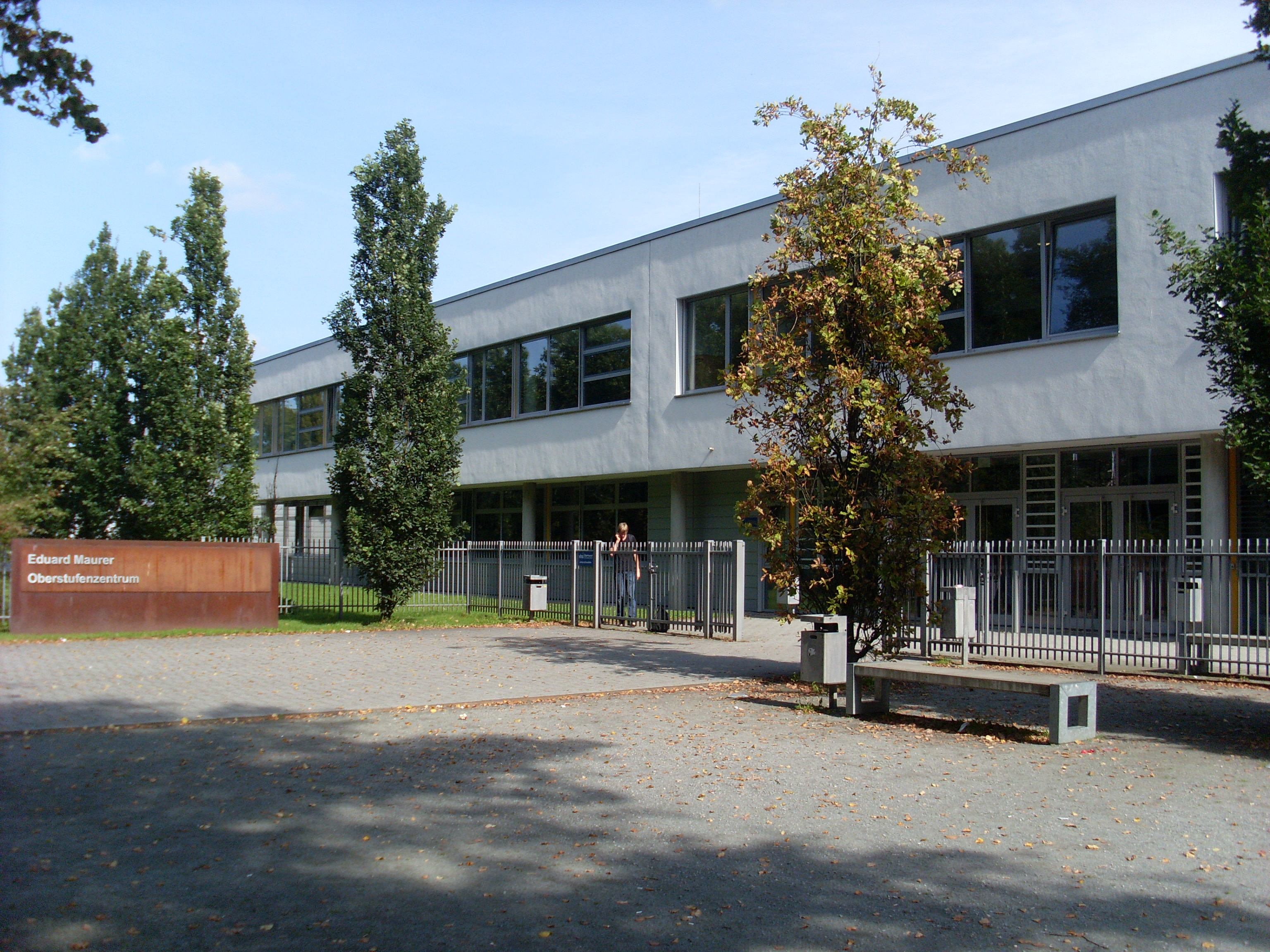 Eduard-Maurer-Oberstufenzentrum (selbst fotografiert)